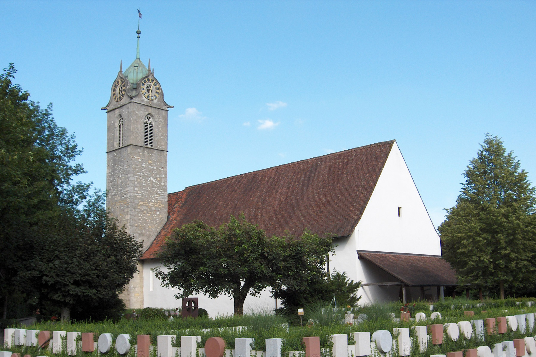 Windisch: Reformierte Kirche Fotografiert durch Voyager, 28. Juni 2006